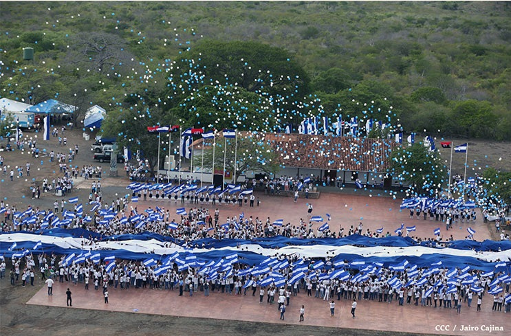 Celebración del 195 aniversario de la independencia de Nicaragua.